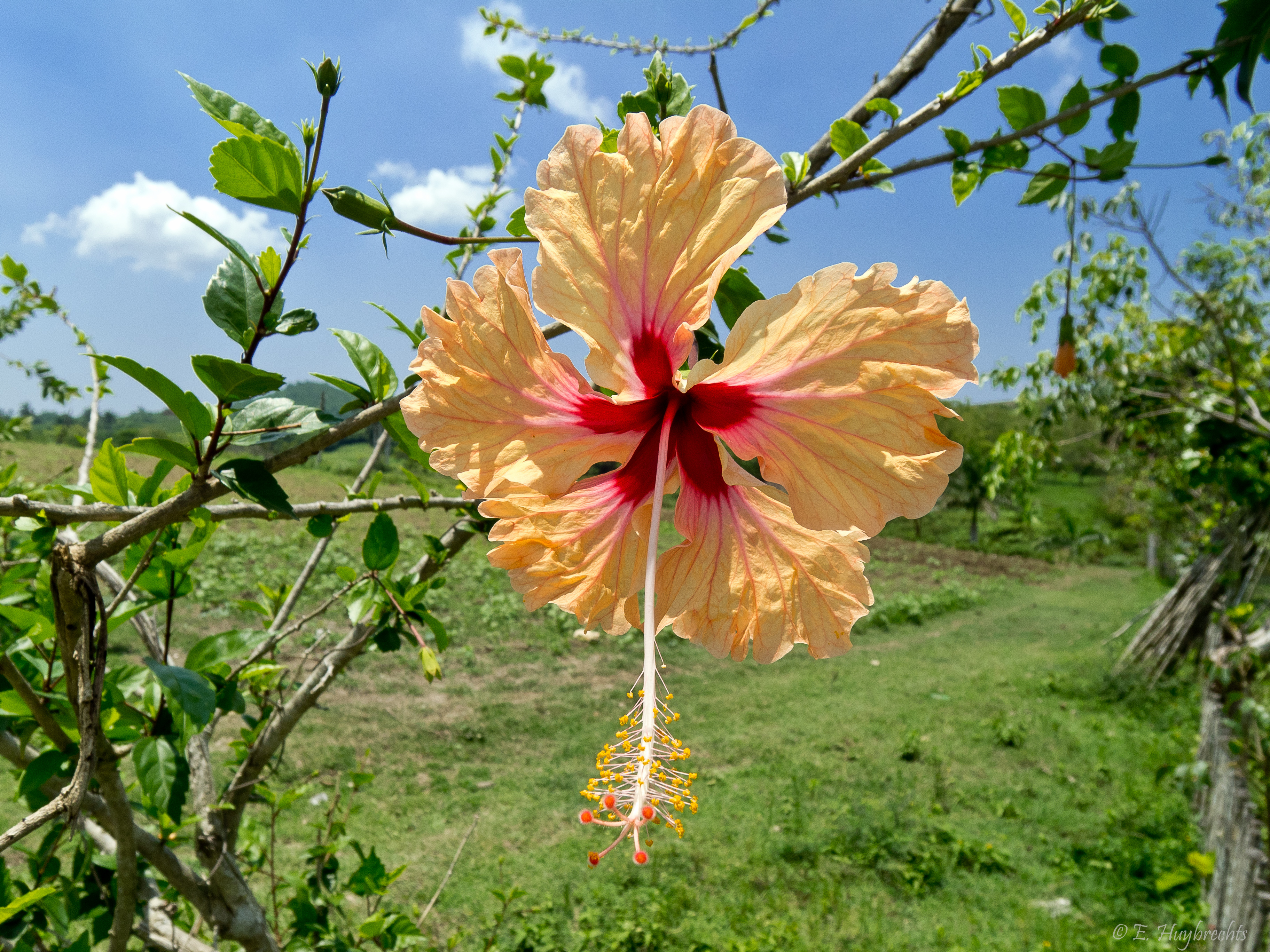 18 juillet 2011 (SAM_0475)